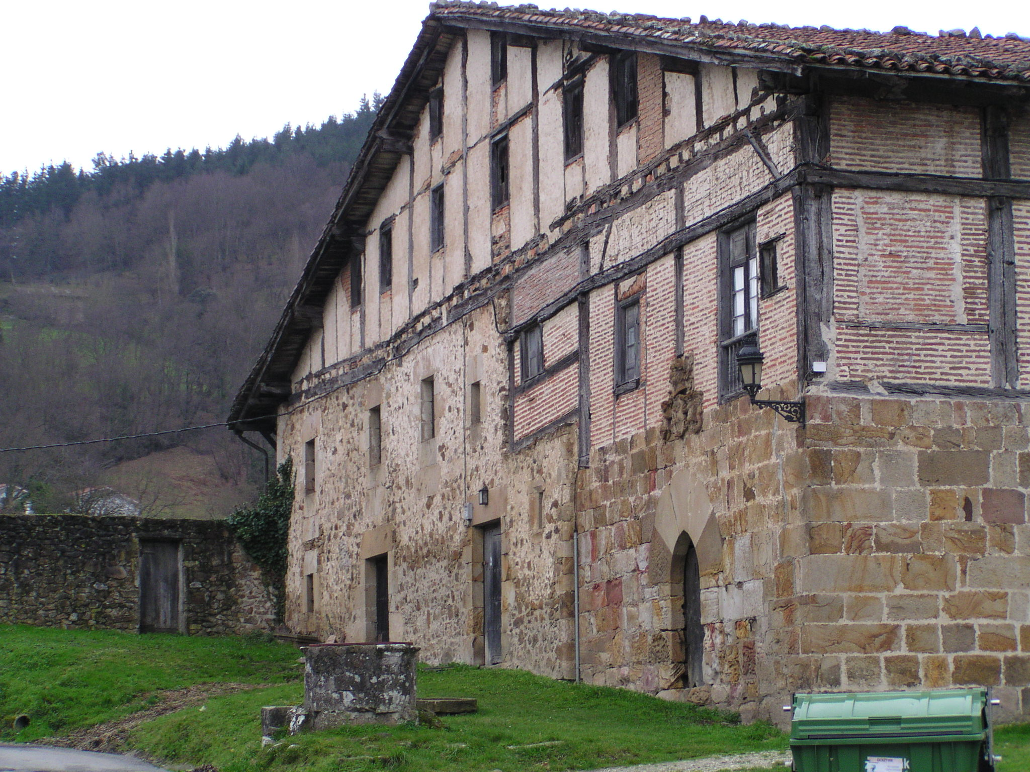 Garai bateko dorretxea.